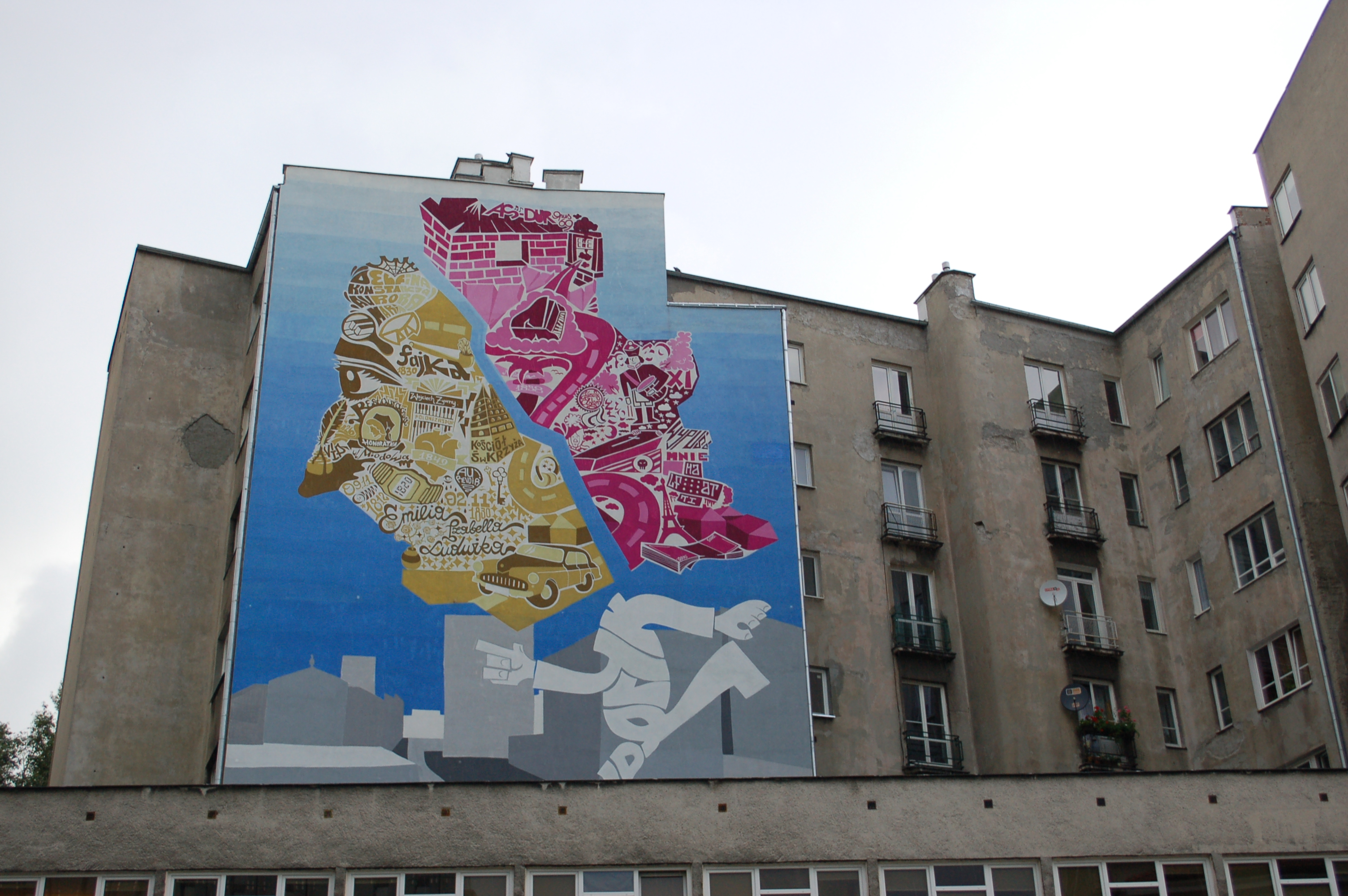 Warschau